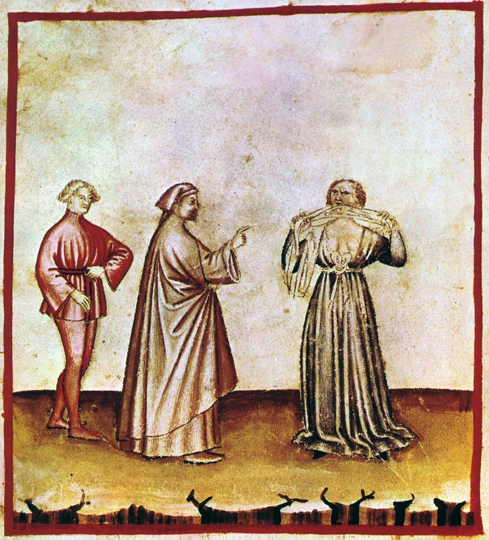 Tacuina sanitatis (XIV century)